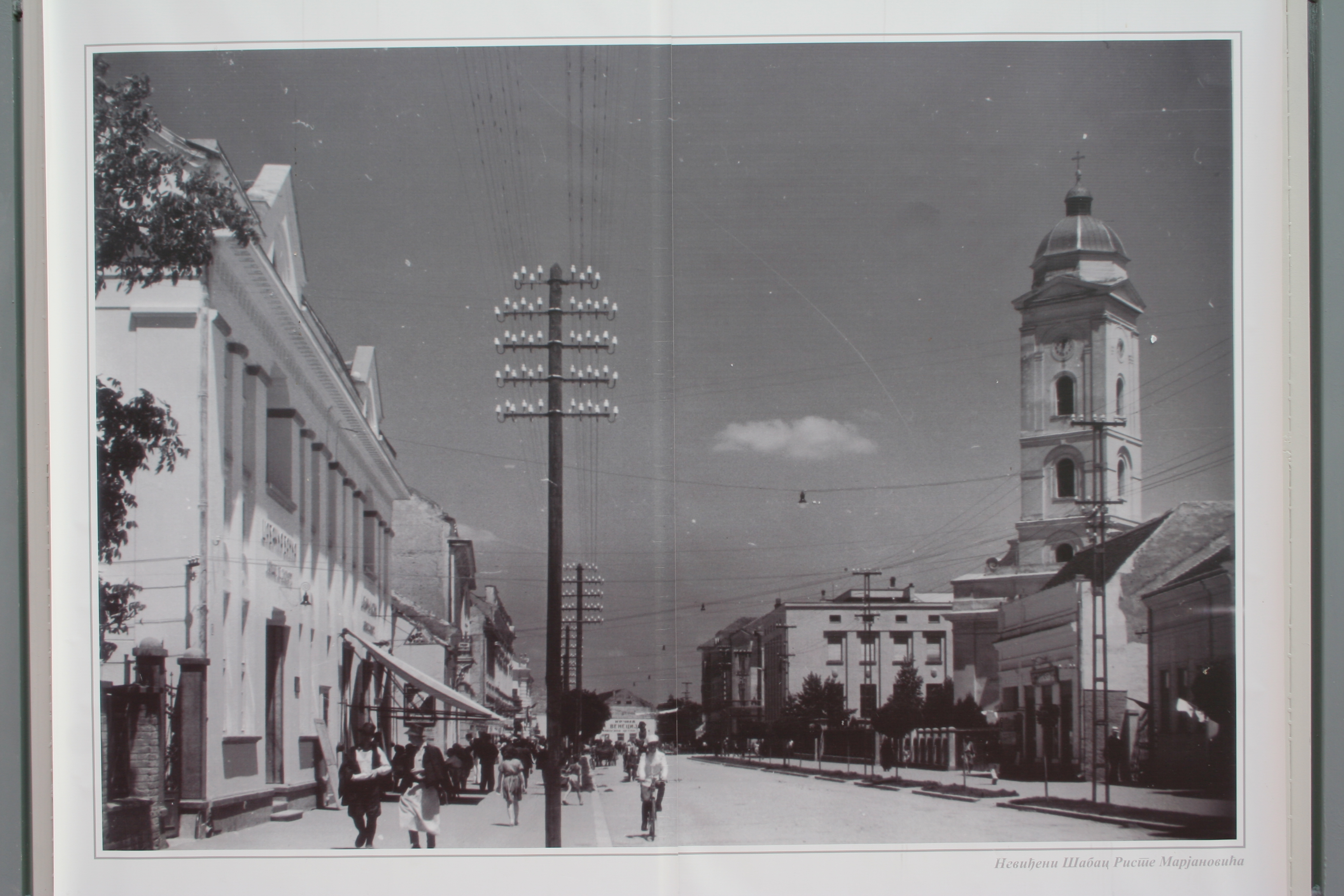 Izložba slika starog Šapca, autora Riste Marjanovića na otvorenomIzložba slika starog Šapca, autora Riste Marjanovića na otvorenom